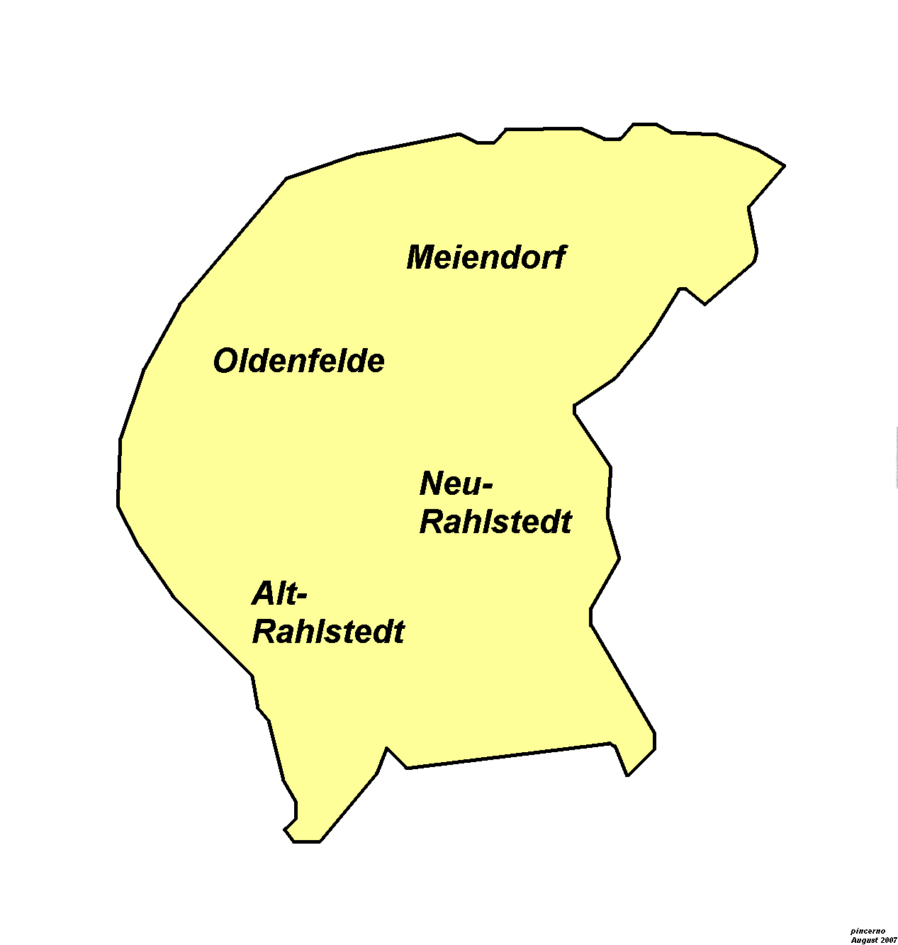 Hamburg - Gemarkungen des Stadtteils Rahlstedt.